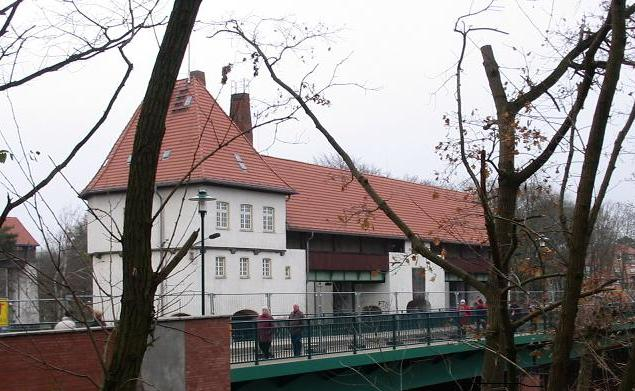 Teltowkanal Brandenburg, Schleuse Kleinmachnow, Bild 3